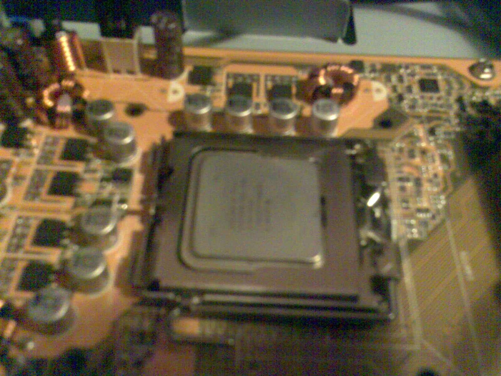 Intel Dual Core 2160